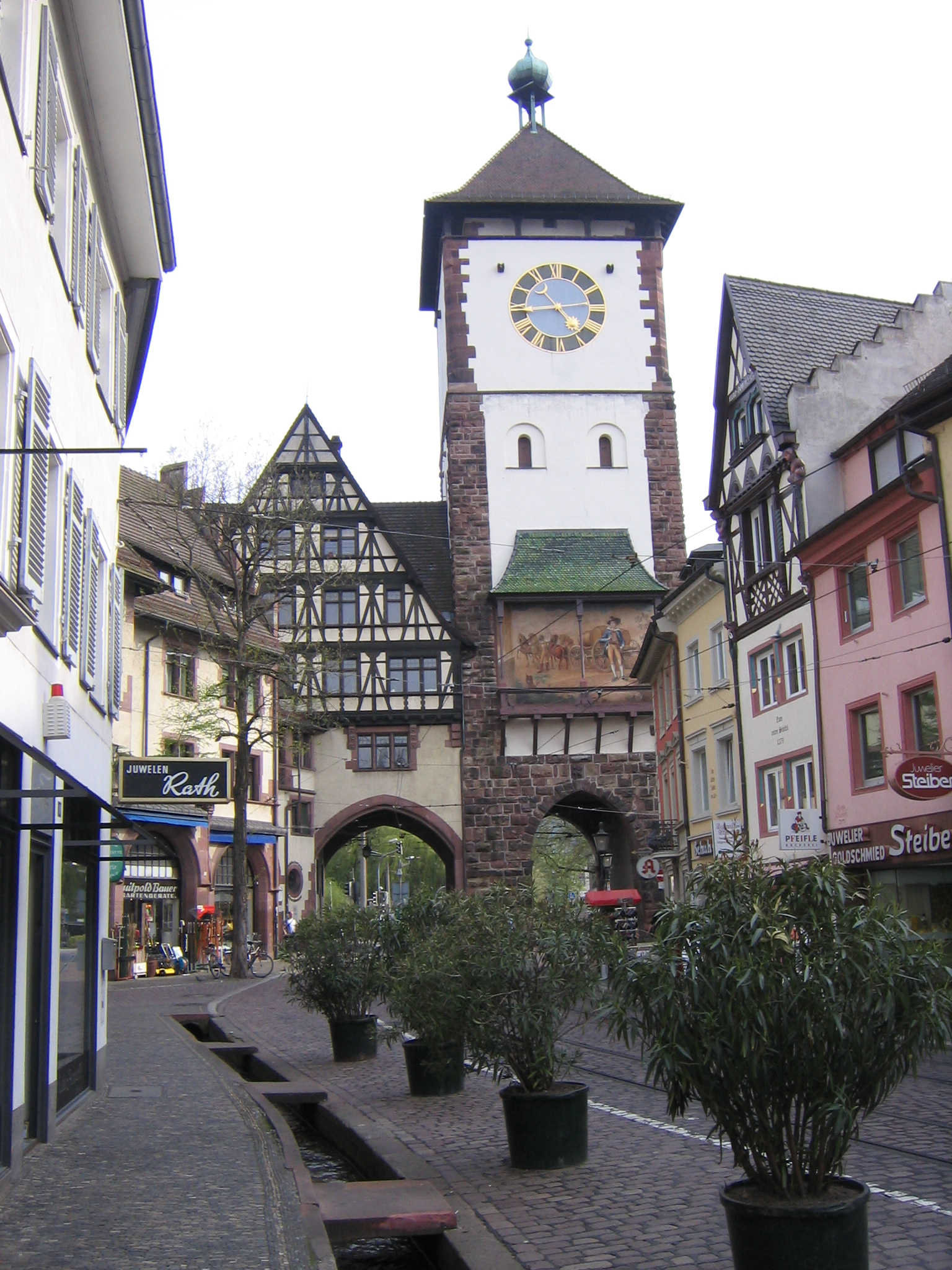 Das Schwabentor, der Beginn der Bächle in der Freiburger Innenstadt